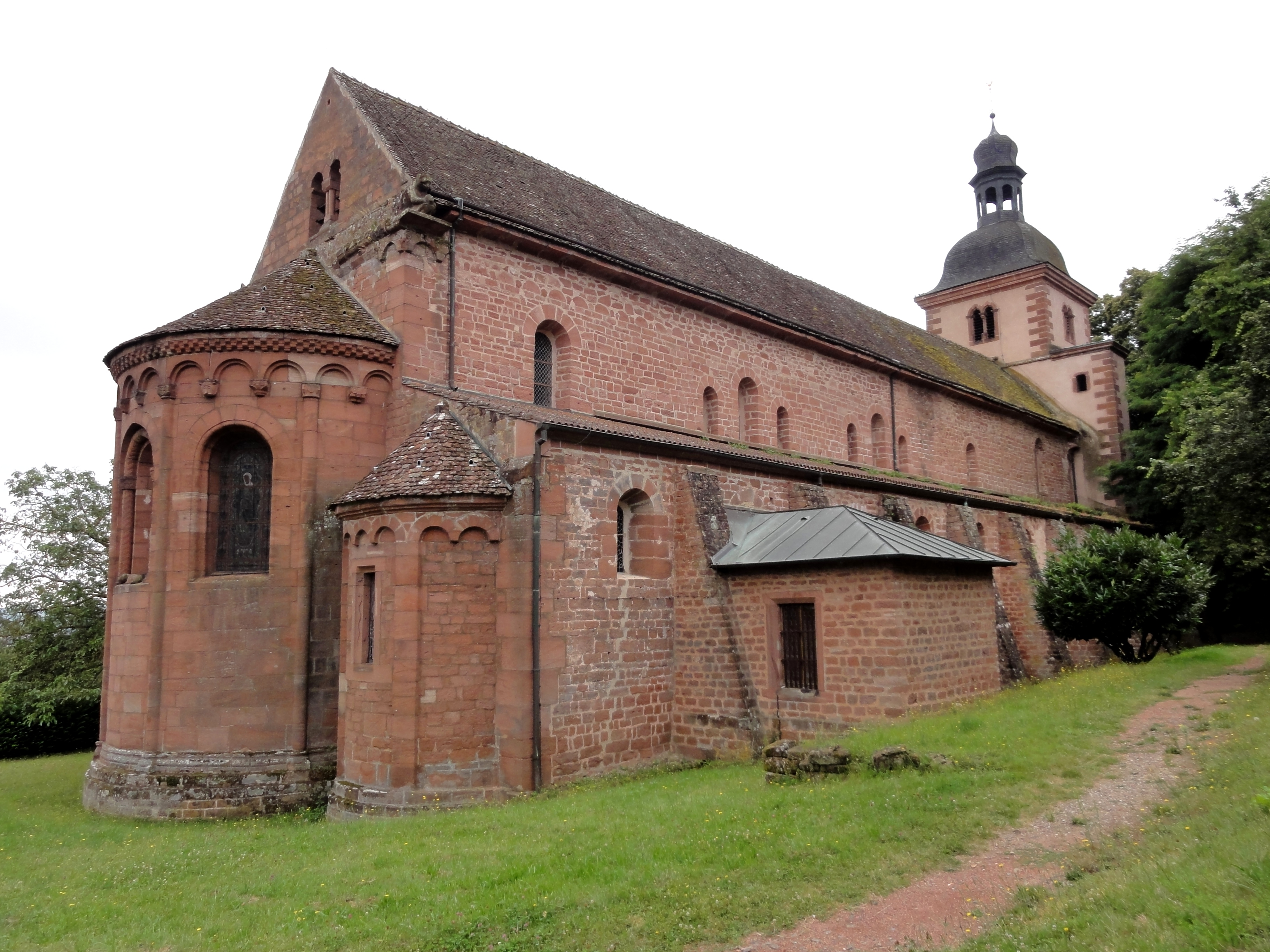 Alsace, Bas-Rhin, Saint-Jean-Saverne, Église abbatiale Saint-Jean-Baptiste (PA00084921, IA00055618).